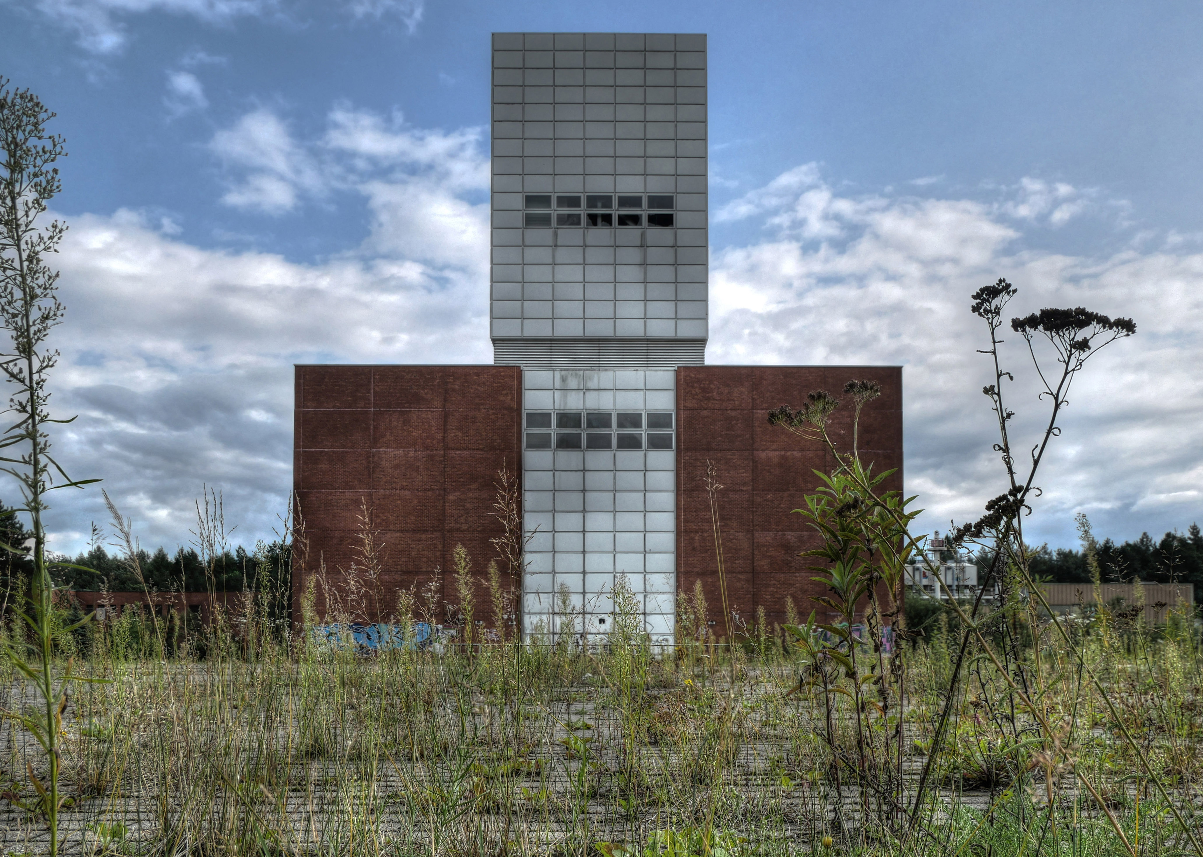 Förderturm